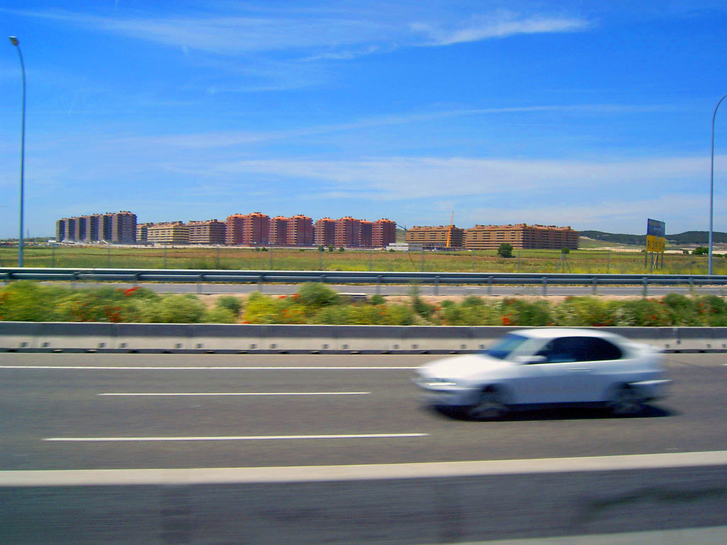 Viviendas de nueva construcción en Seseña (Toledo), España.